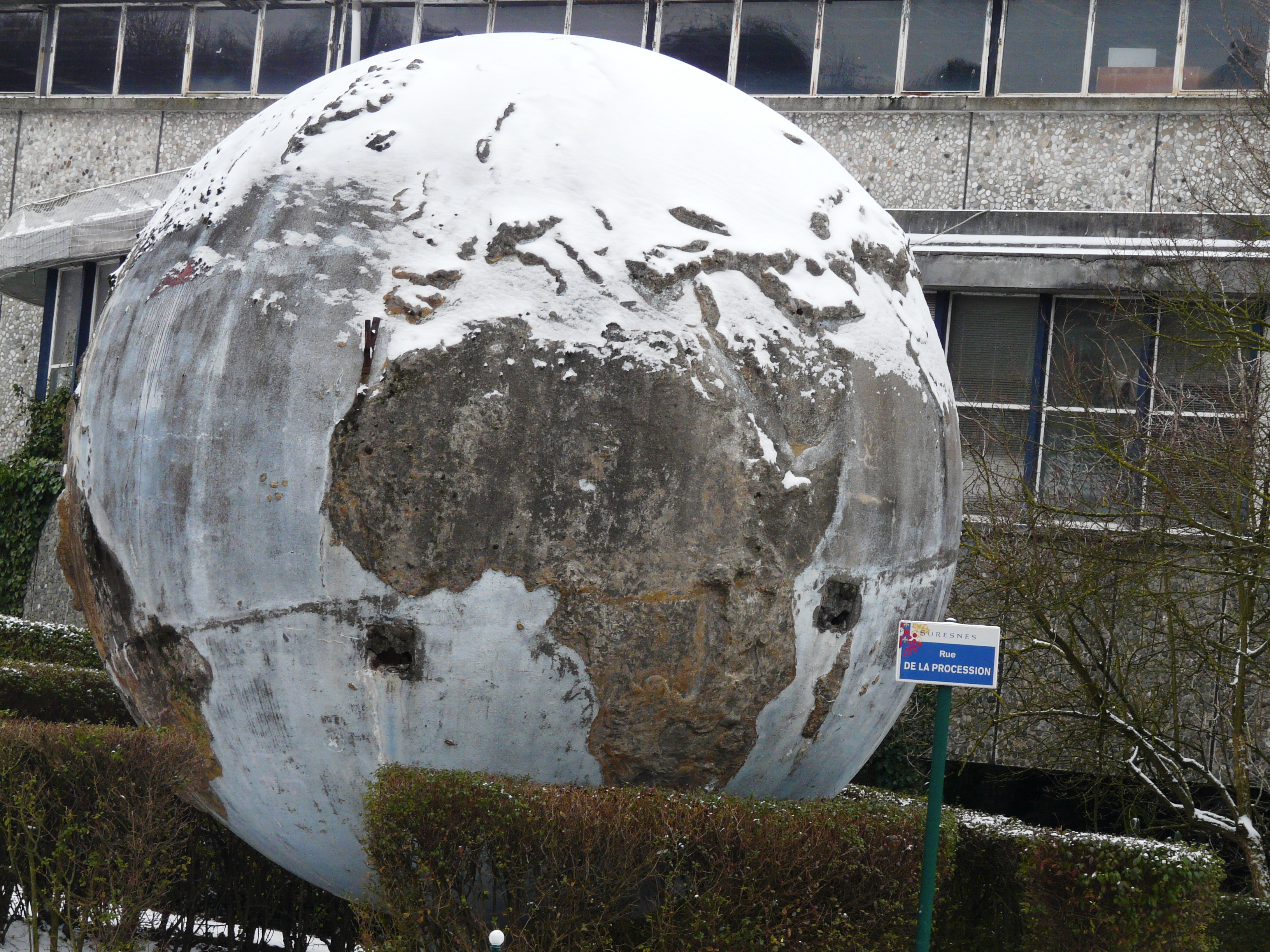 Réchauffement climatique ou nouvelle glaciation?